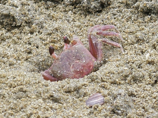 Ocypode stimpsoni (スナガニ), Saikai, Nagasaki(長崎県西海市)